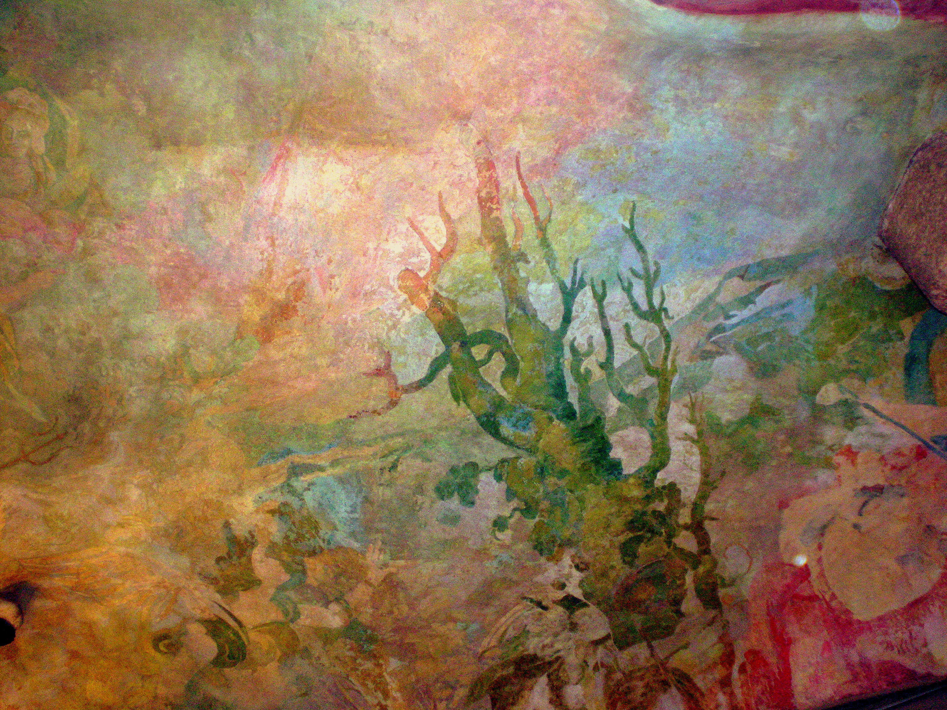 .Barcelona - La Pedrera. Sostre de l´entrada del carrer Provença obra d'Iu Pascual